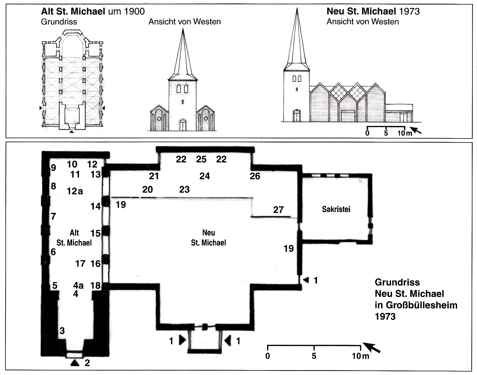 Grundriss/Aufriss St. Michael und Innenausstattung mit Erläuterung